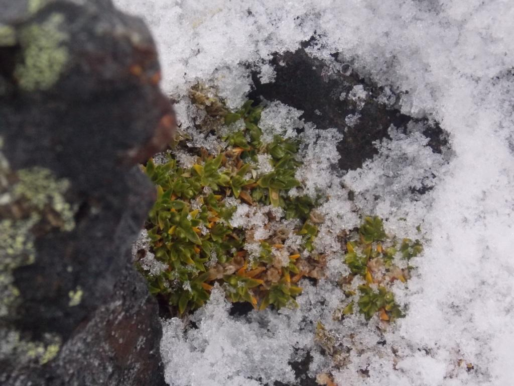 Перлинниця добре переносить усі примхи антарктичного довкілля. Фото І. Парнікози. Район Аргентинських островів. 2014 р.